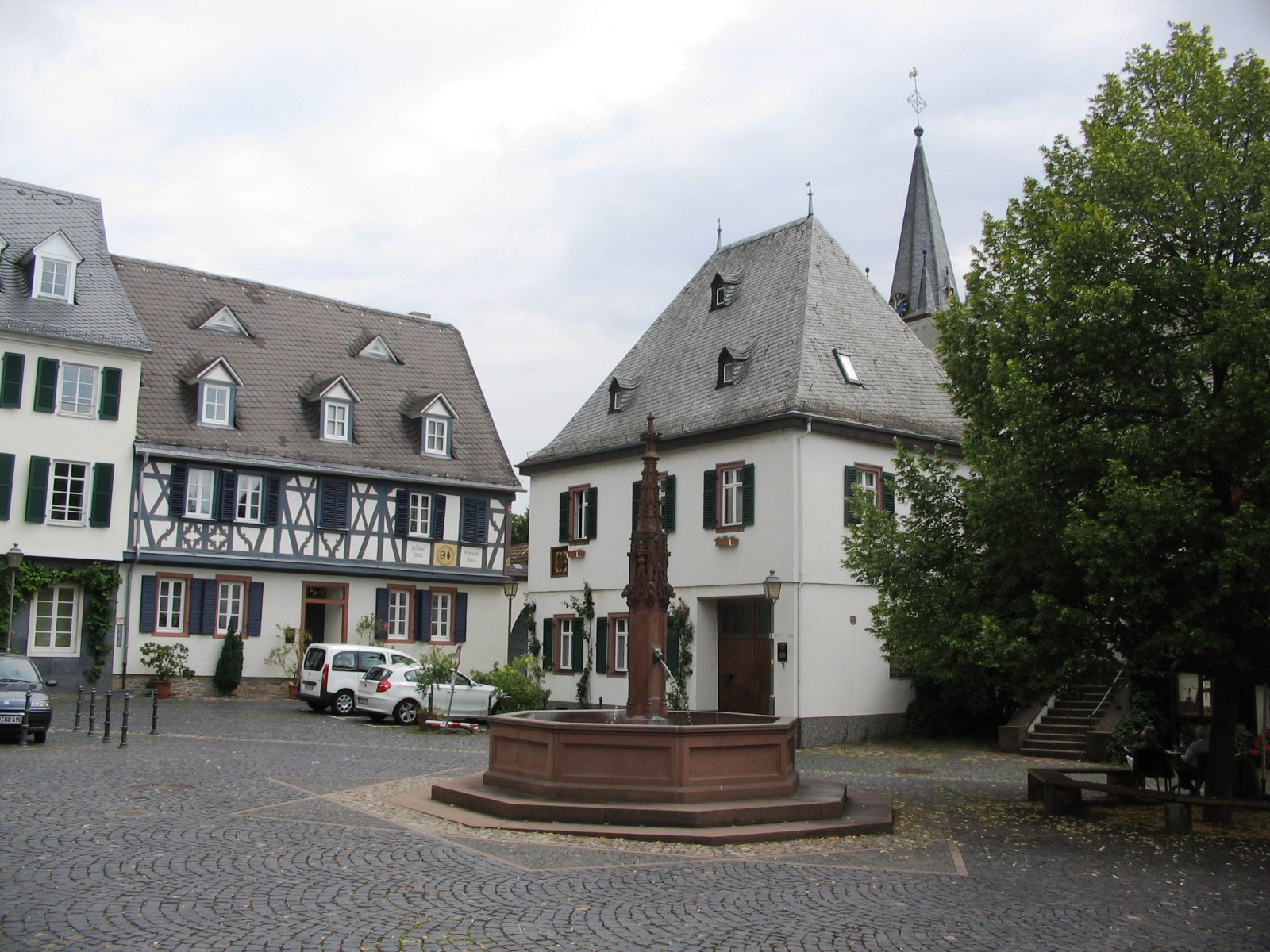 Marktplatz von Oestrich mit Marktbrunnen, im Hintergrund der Turm der Pfarrkirche St. Martin, Ansicht von Nordwesten